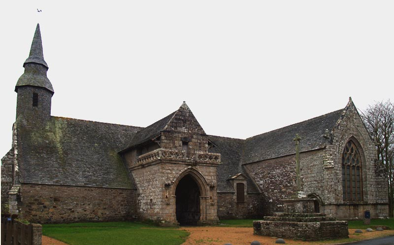 Chapelle Kermaria an Iskuit, commune de Plouha, Côtes-d'Armor (22), France. Façade sud.